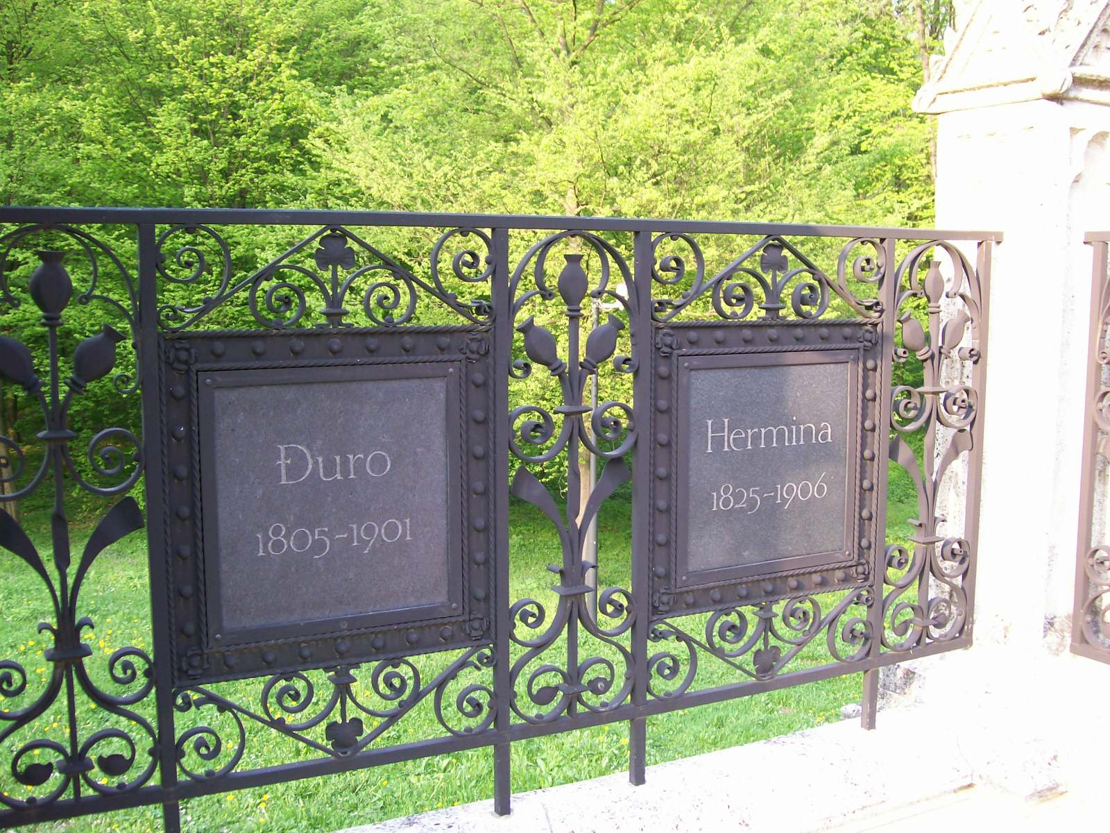 Natpis Đuro Jelačić i Hermina Jelačić na obiteljskoj grobnici Jelačićevih u Novim dvorima u Zaprešiću